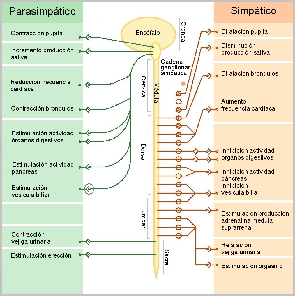 Representación esquemática de las principales funciones del sistema simpático y parasimpático